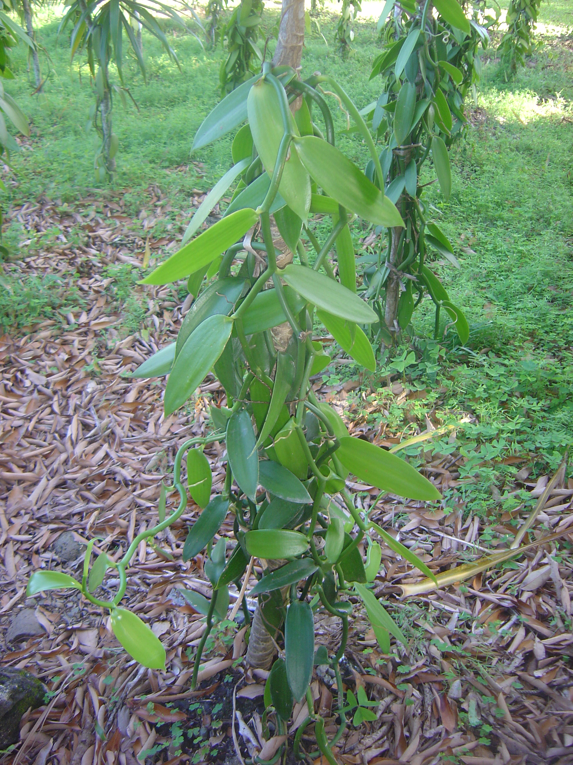 A vanilla planifolia vine grown on Réunion Island (Maison de la Vanille, Saint-André).